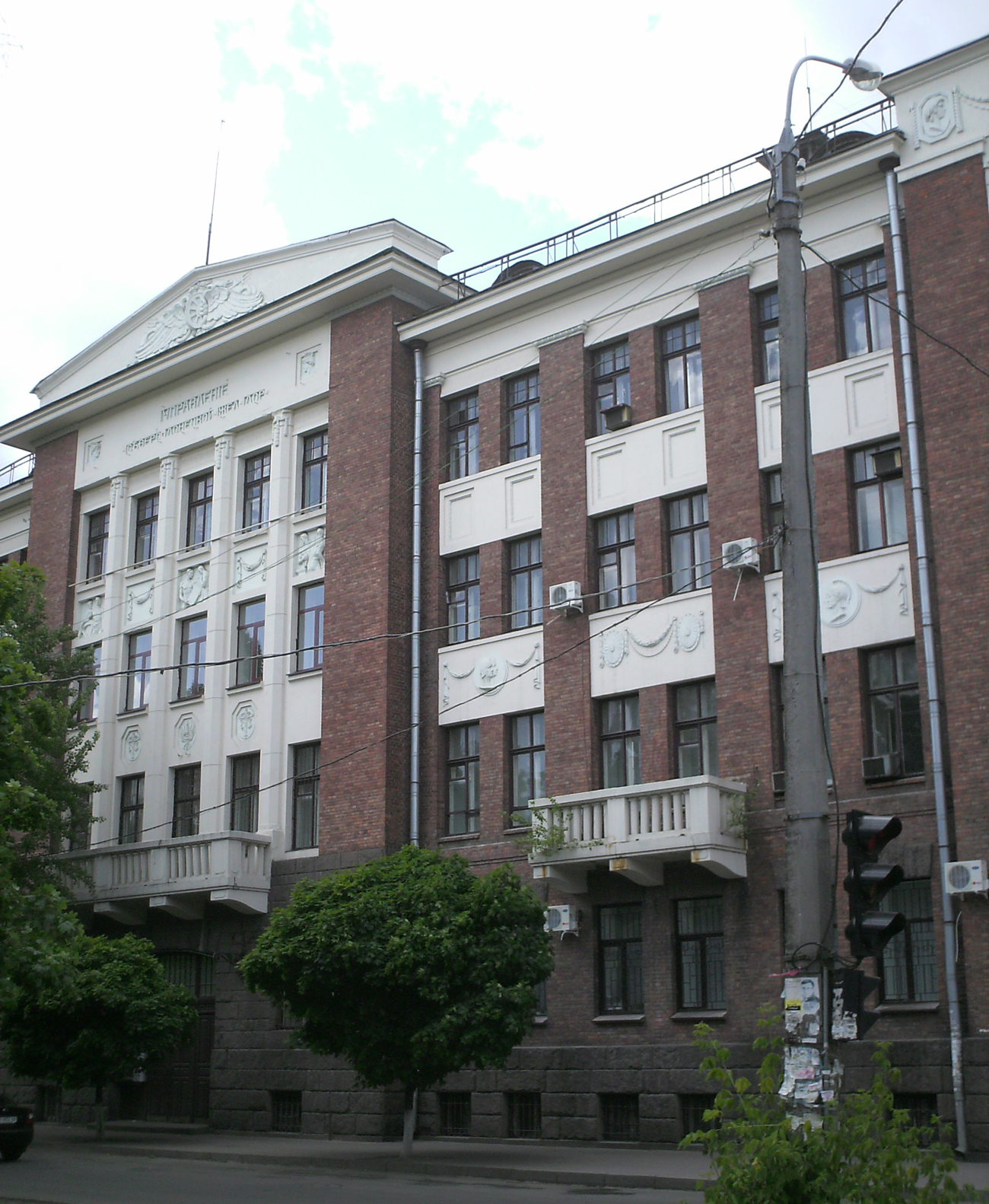 описание